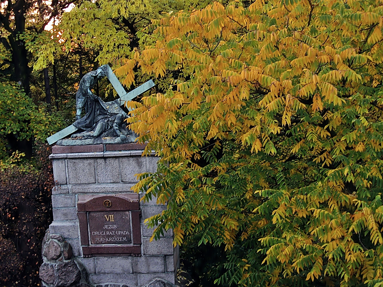 Częstochowa - zespół klasztorny oo. Paulinów (stacje drogi krzyżowej Piusa Welońskiego)